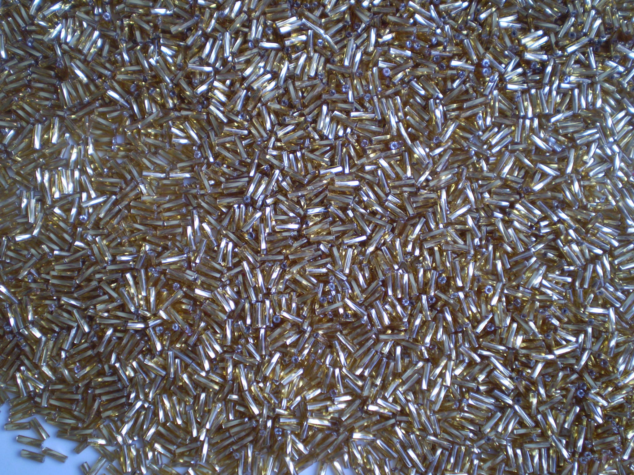 Canutilho, ornamento para bijuterias